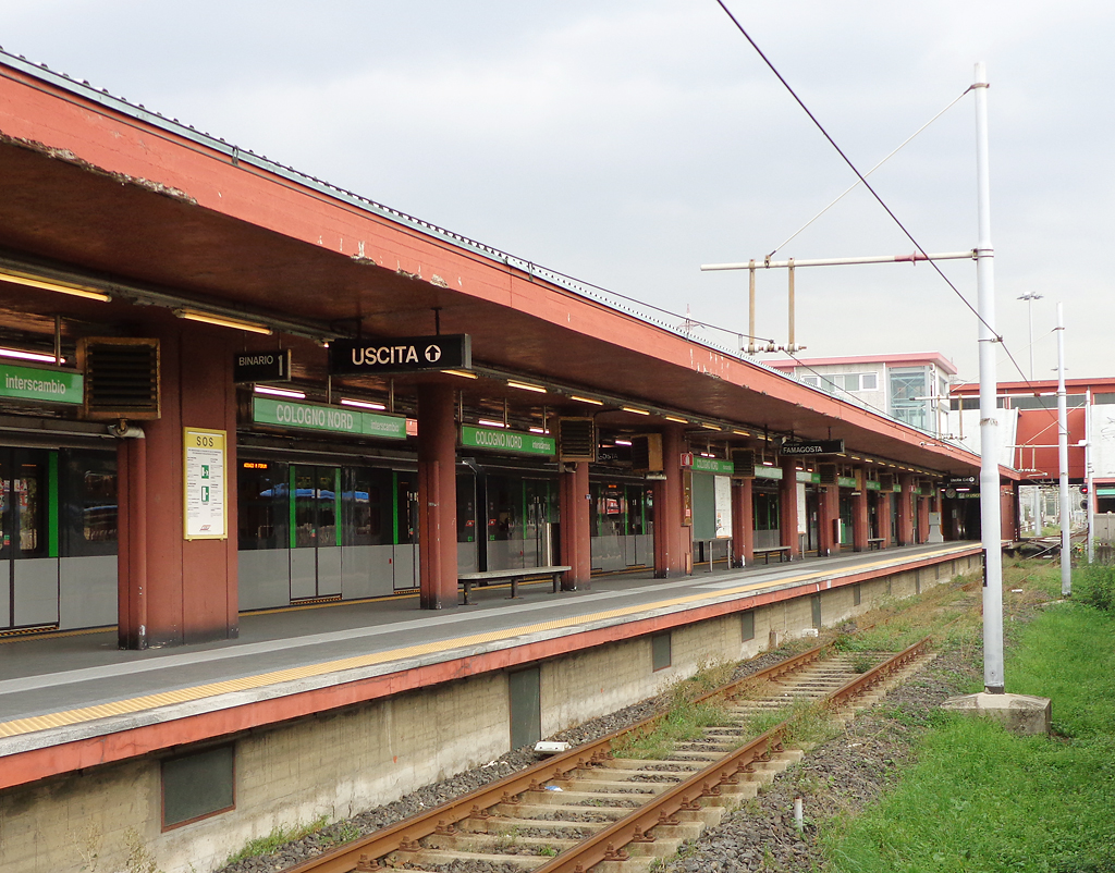 Cologno Monzese, la stazione della metropolitana di Cologno Nord